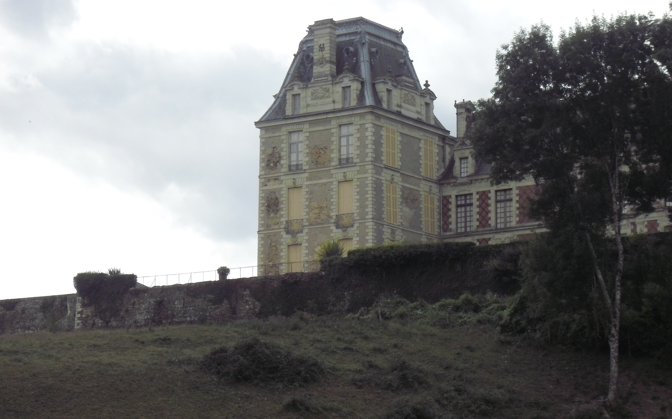 château de la Rongère ( Saint Sulpice) en Mayenne ( classé monument historique 1991) , France , Pays de la Loire.